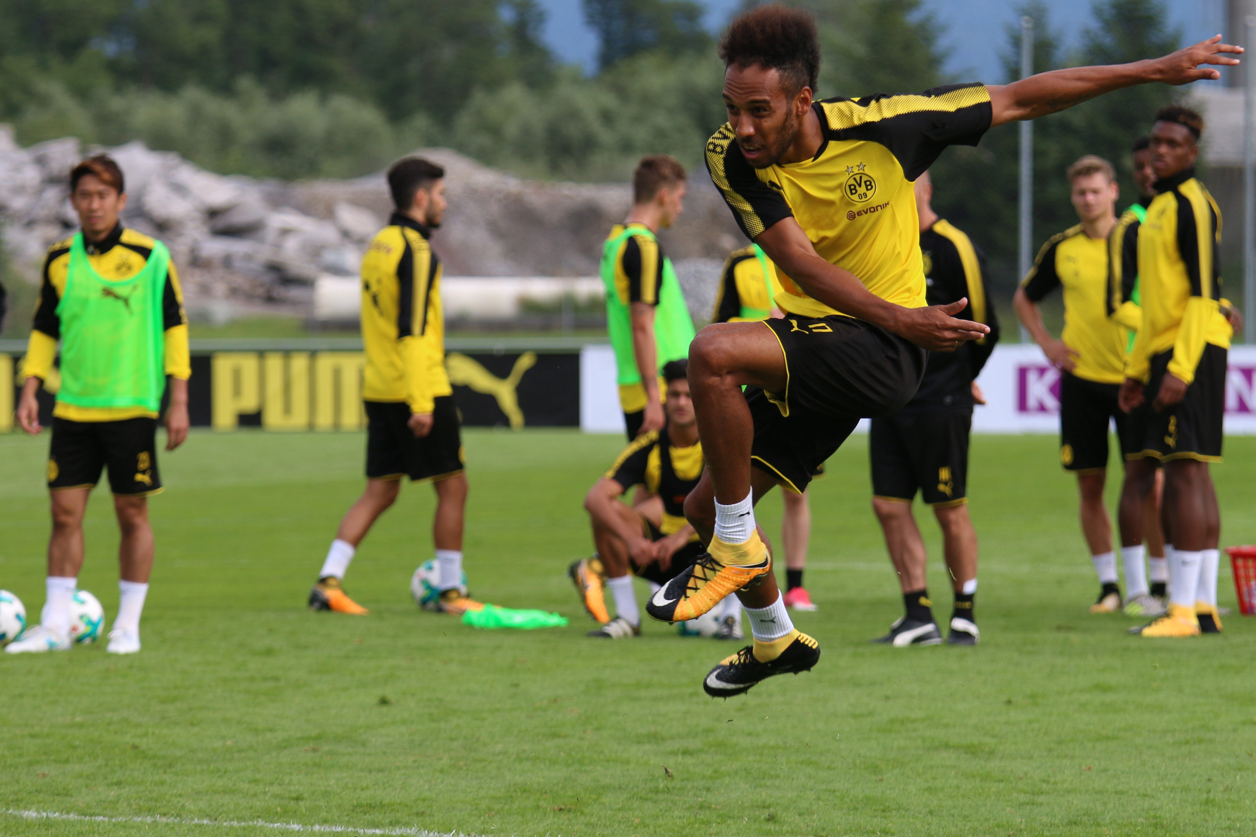 Pierre-Emerick Aubameyang im BVB Trainingslager in Bad Ragaz 2017